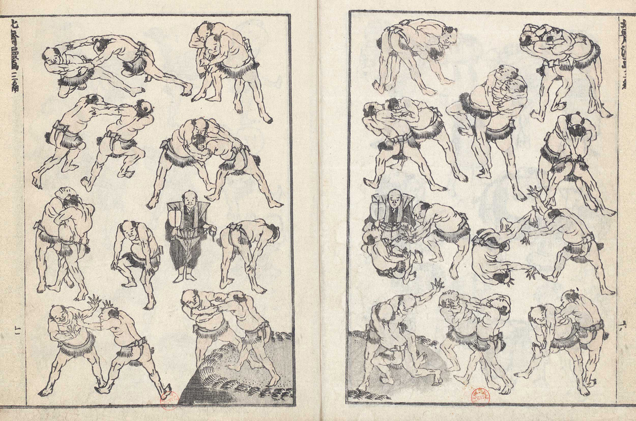 Lutteurs de sûmo, extrait de la Manga de Hokusai, c.1812- 1878